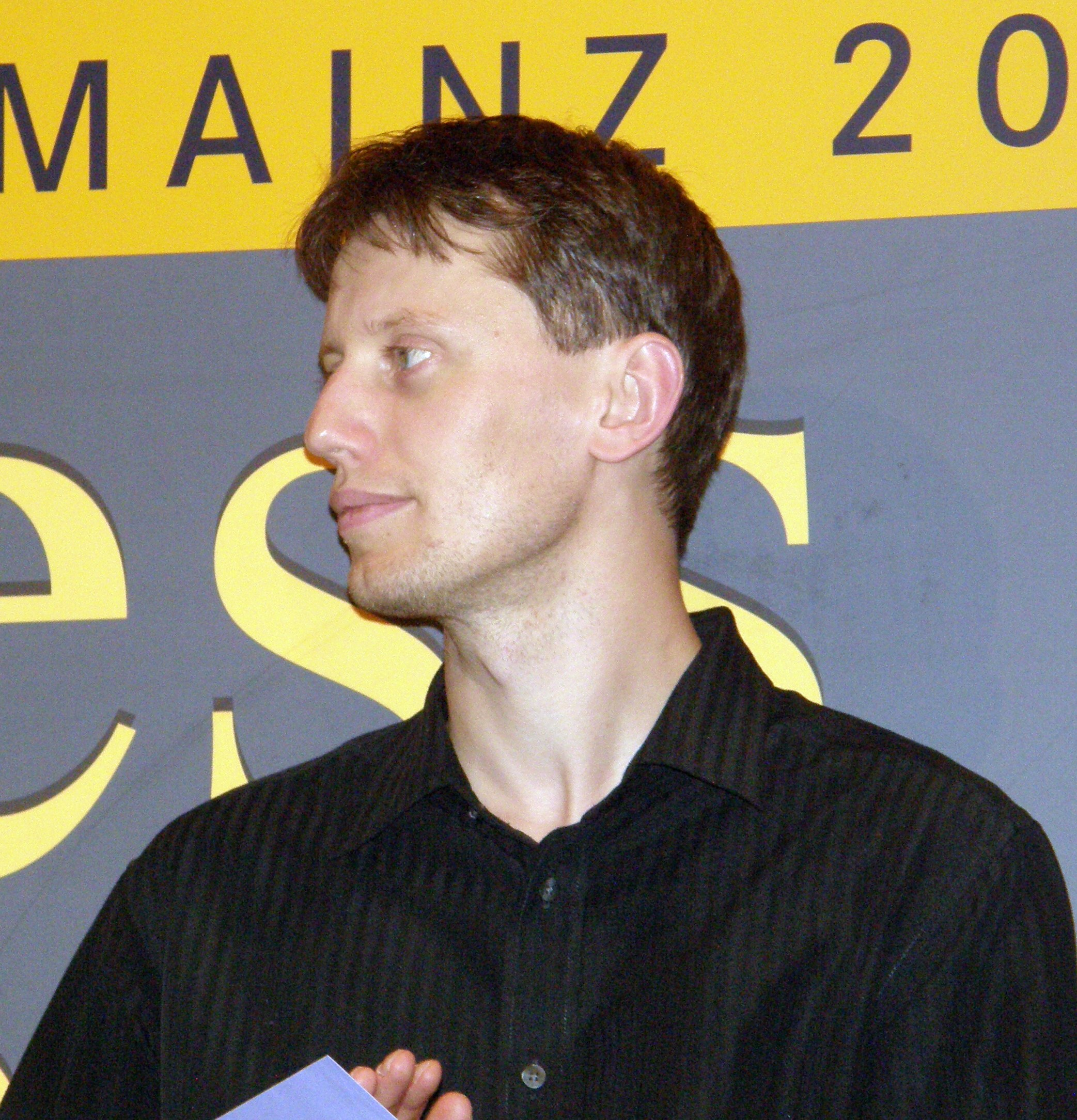 Гроссмейстер Золтан Алмаши